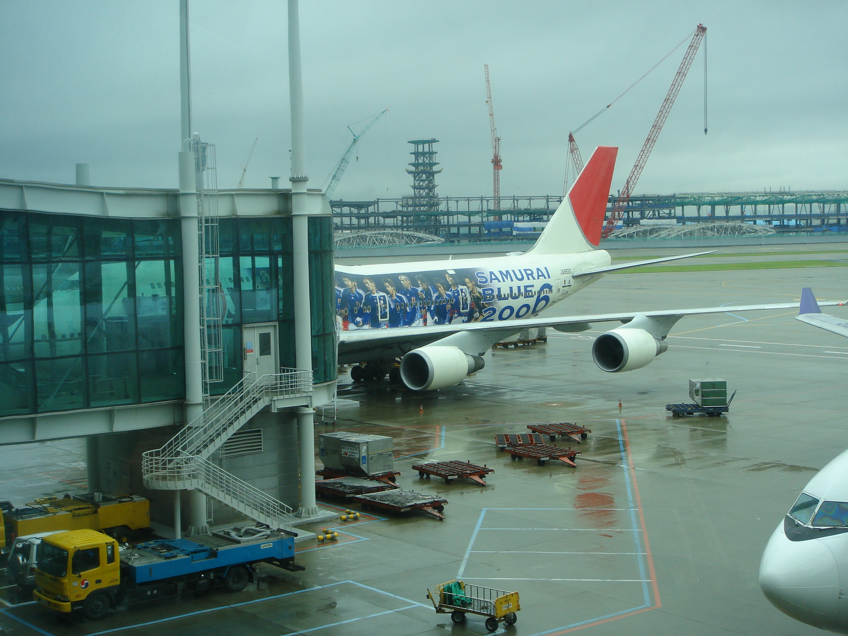 ファイル:2006FIFASamuraiBlue.JPG